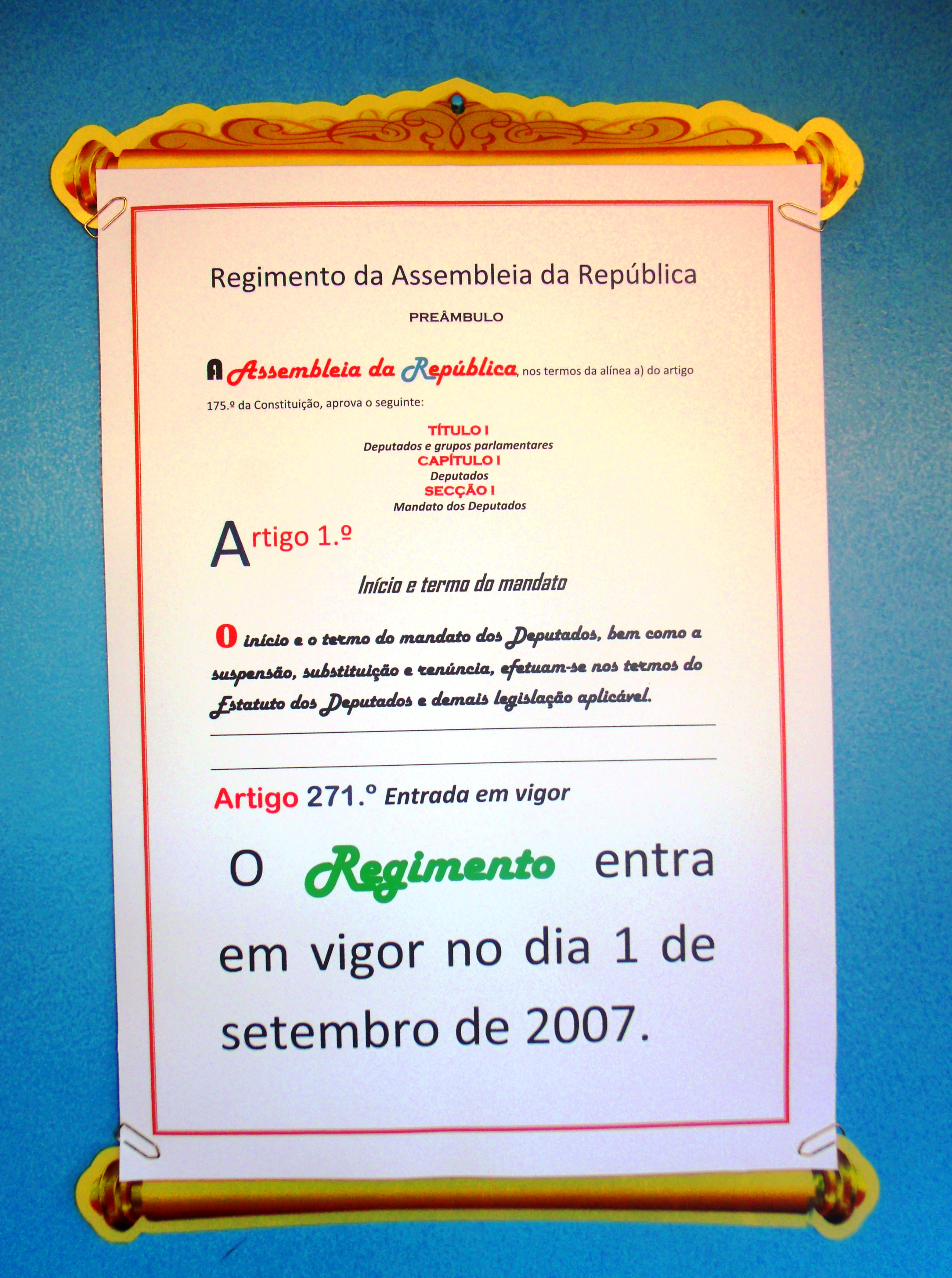 Preâmbulo e atigos 1º e 271º do Regimento da Assembleia da República. Essa peça foi feita para o Wikimedia Commons.